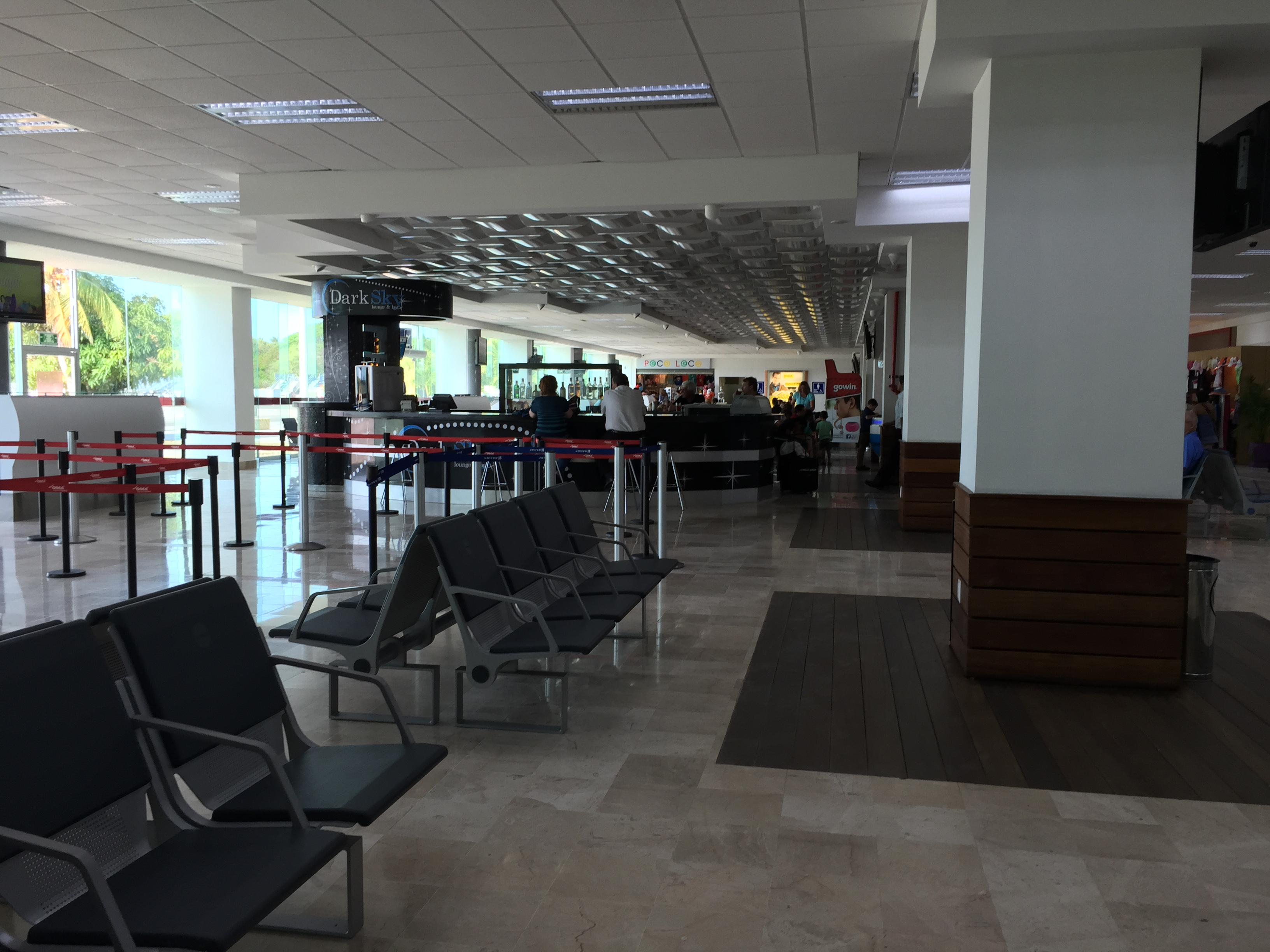 Sala de última espera del Aeropuerto de Ixtapa-Zihuatanejo.